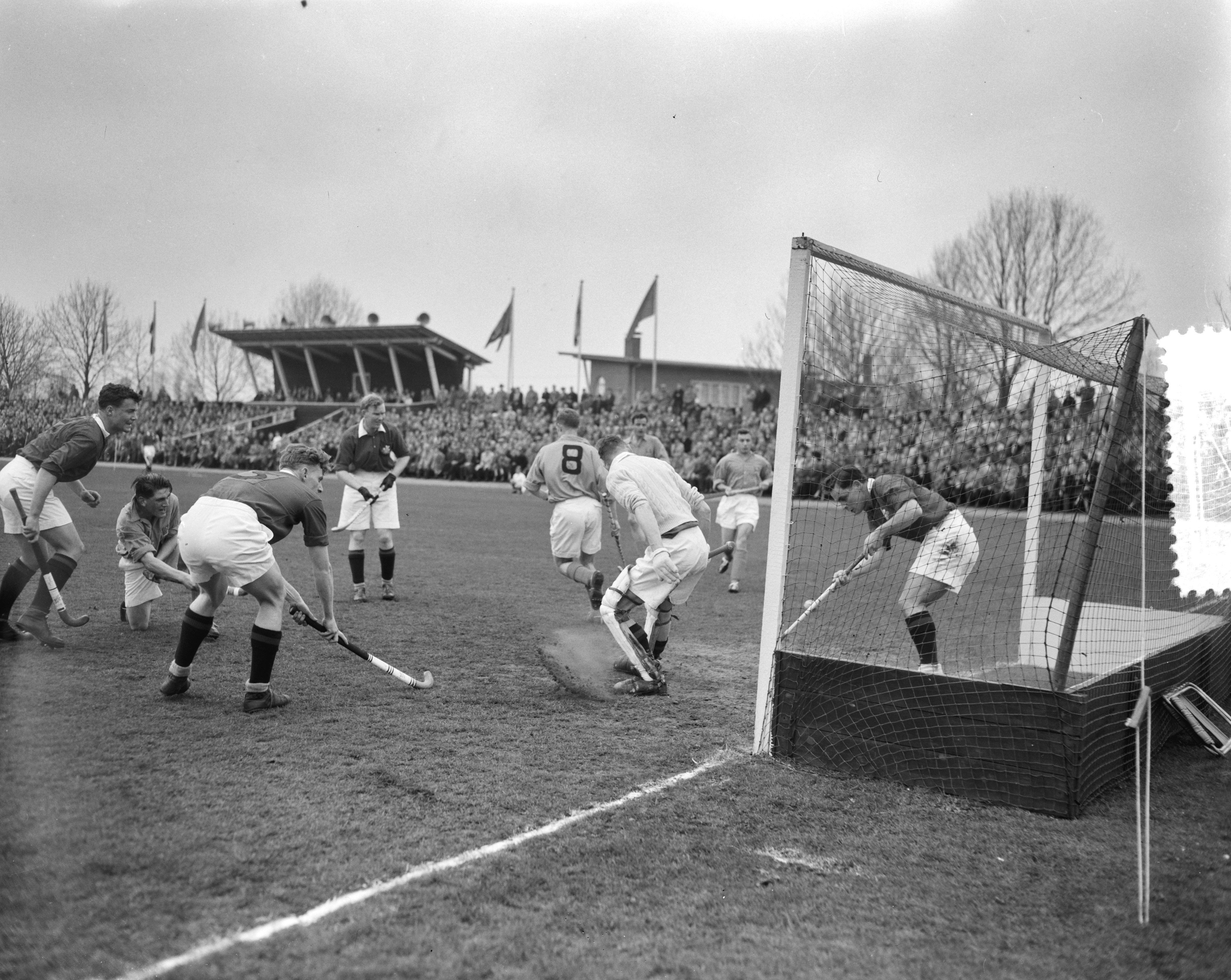 Collectie / Archief : Fotocollectie Anefo Reportage / Serie : [ onbekend ] Beschrijving : Hockey Nederland tegen Wales 3-1 Datum : 21 april 1956 Locatie : Nederland, Wales Trefwoorden : hockey Fotograaf : Pot, Harry / Anefo Auteursrechthebbende : Nationaal Archief Materiaalsoort : Negatief (zwart/wit) Nummer archiefinventaris : bekijk toegang 2.24.01.04 Bestanddeelnummer : 907-7082